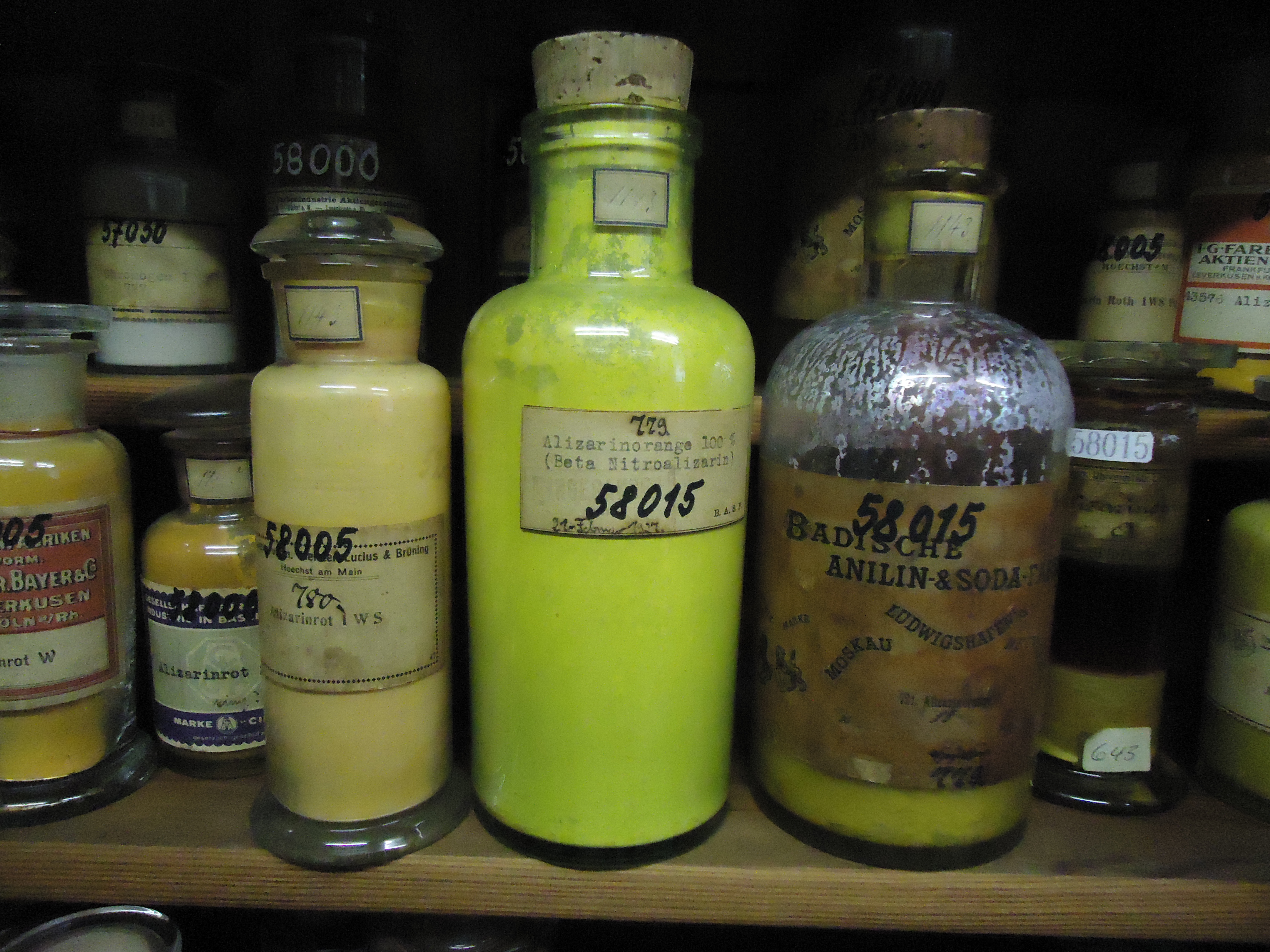 Blick in die Historische Farbstoffsammlung der TU Dresden (Historische Farbstoffsammlung der TU Dresden)